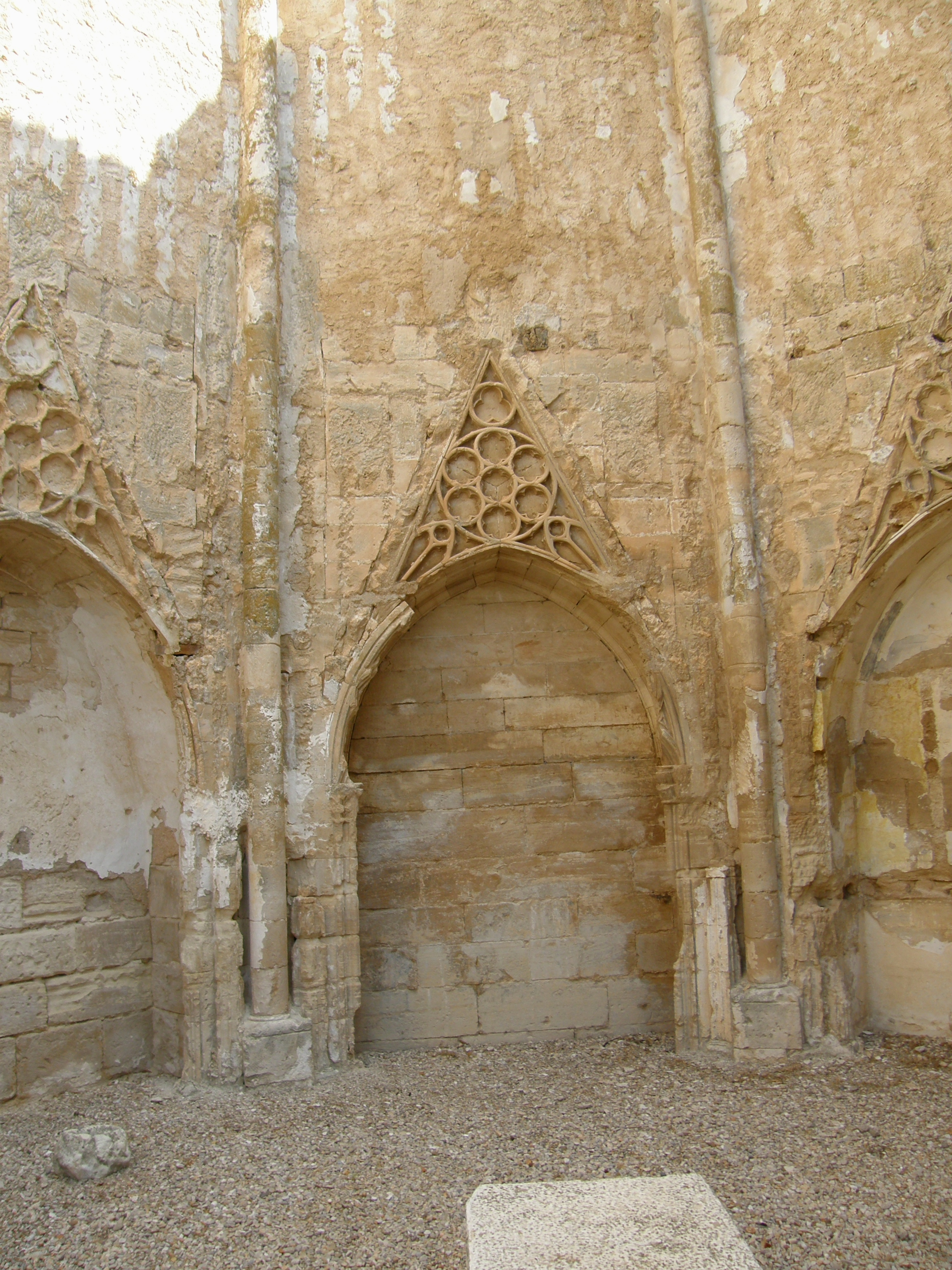 Ábside iglesia covento agustinos